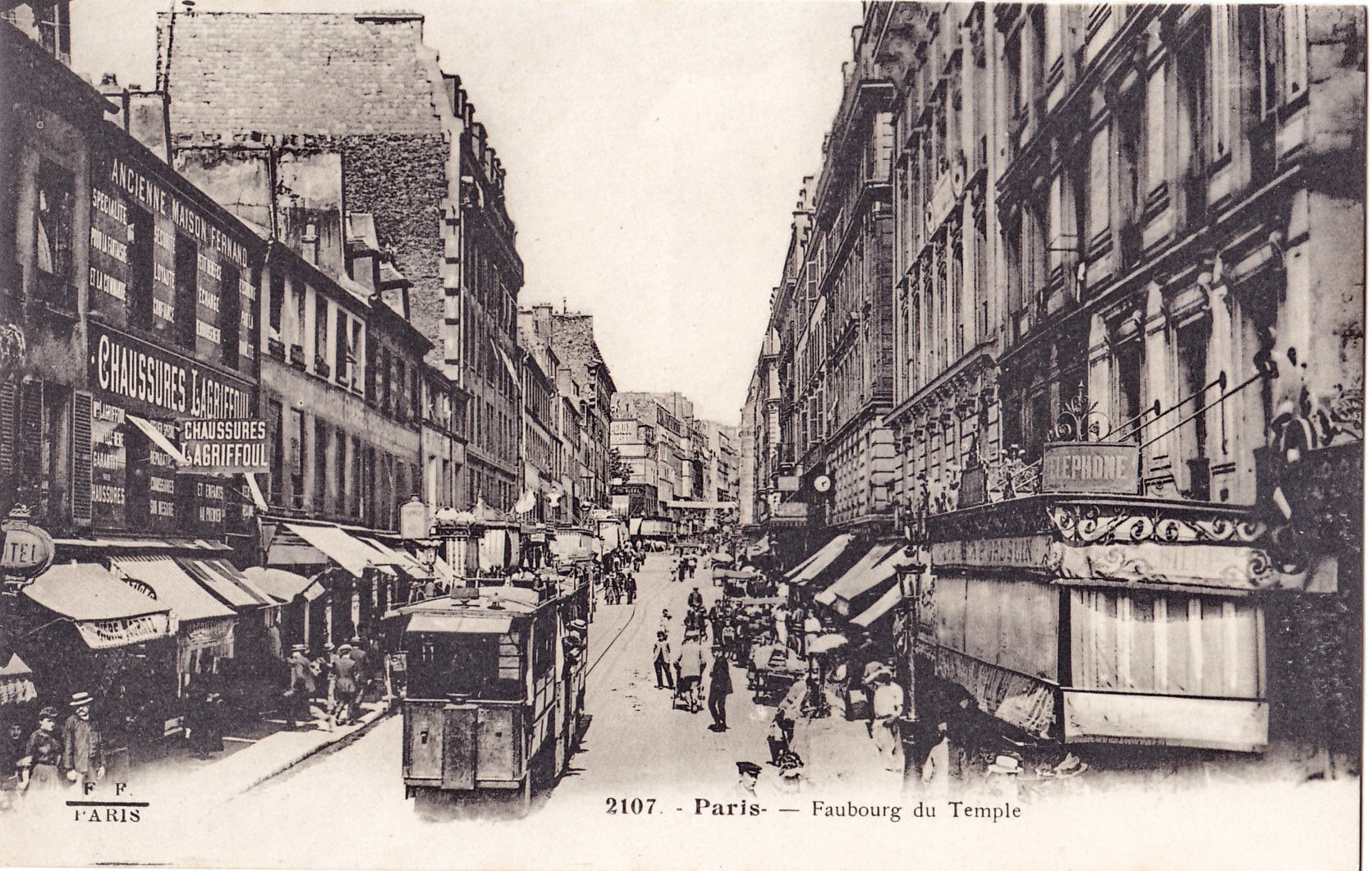 Carte postale ancienne éditée par FF à Paris, n°2107 : PARIS - Faubourg du Temple